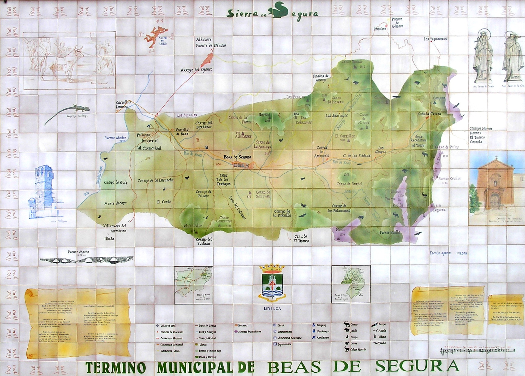 Mural de azulejos pintados sobre Beas